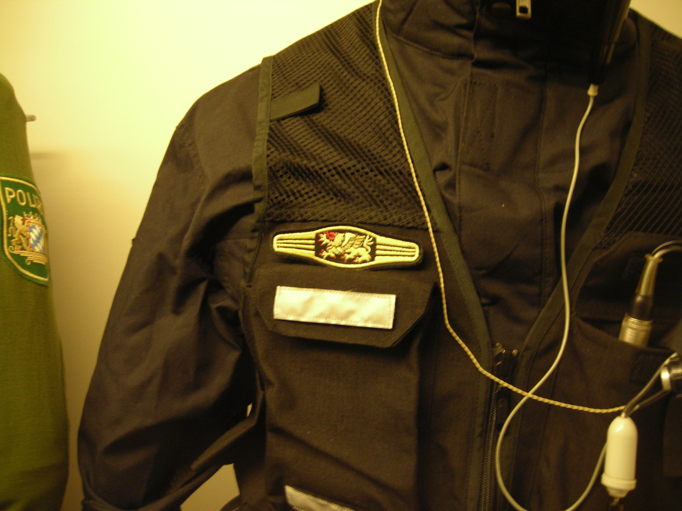 Uniform-Abzeichen des Unterstützungskommandos der Bayerischen Polizei, gesehen in der Sonderausstellung 60 Jahre Bayerische Polizei in Ingolstadt - Uniform und Abzeichen werden heute noch getragen